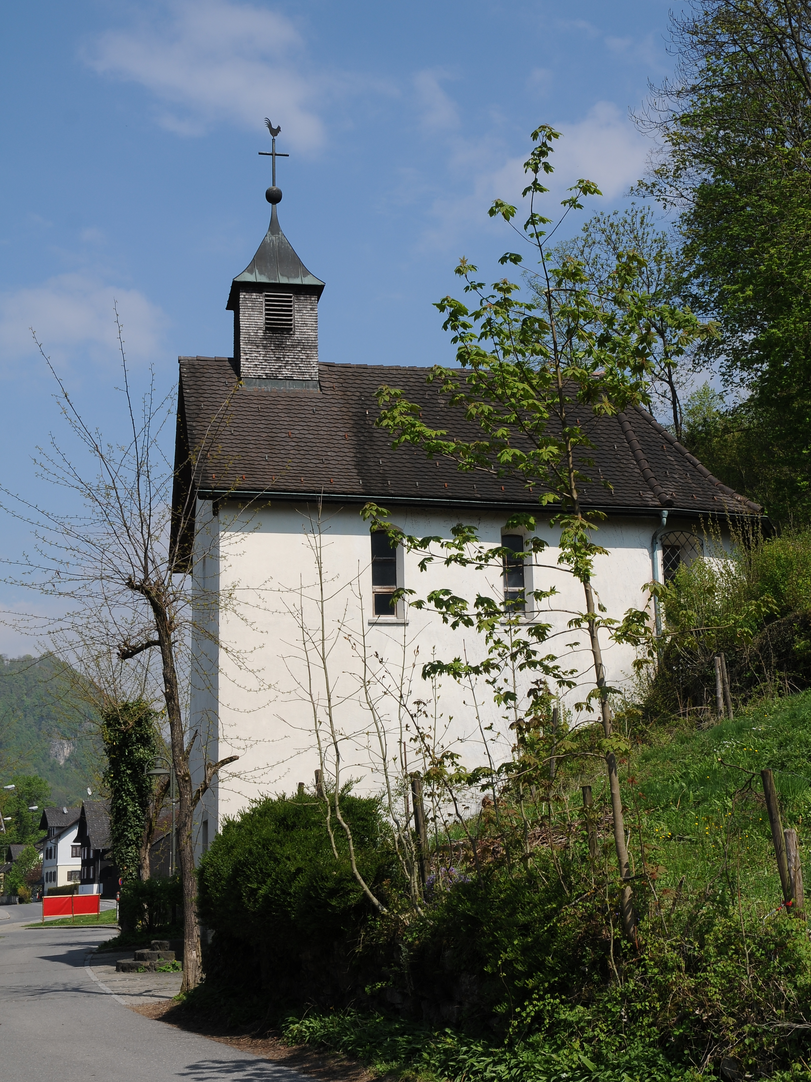 Kapelle Hl. Dreifaltigkeit an der Kaiser-Franz-Josef-Straße in Hohenems; Info Dieses Objekt steht unter Denkmalschutz.